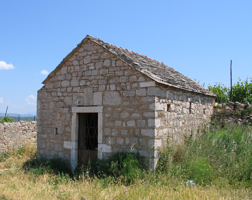 kapela sv. Jelene u Starigradskom polju na Hvaru